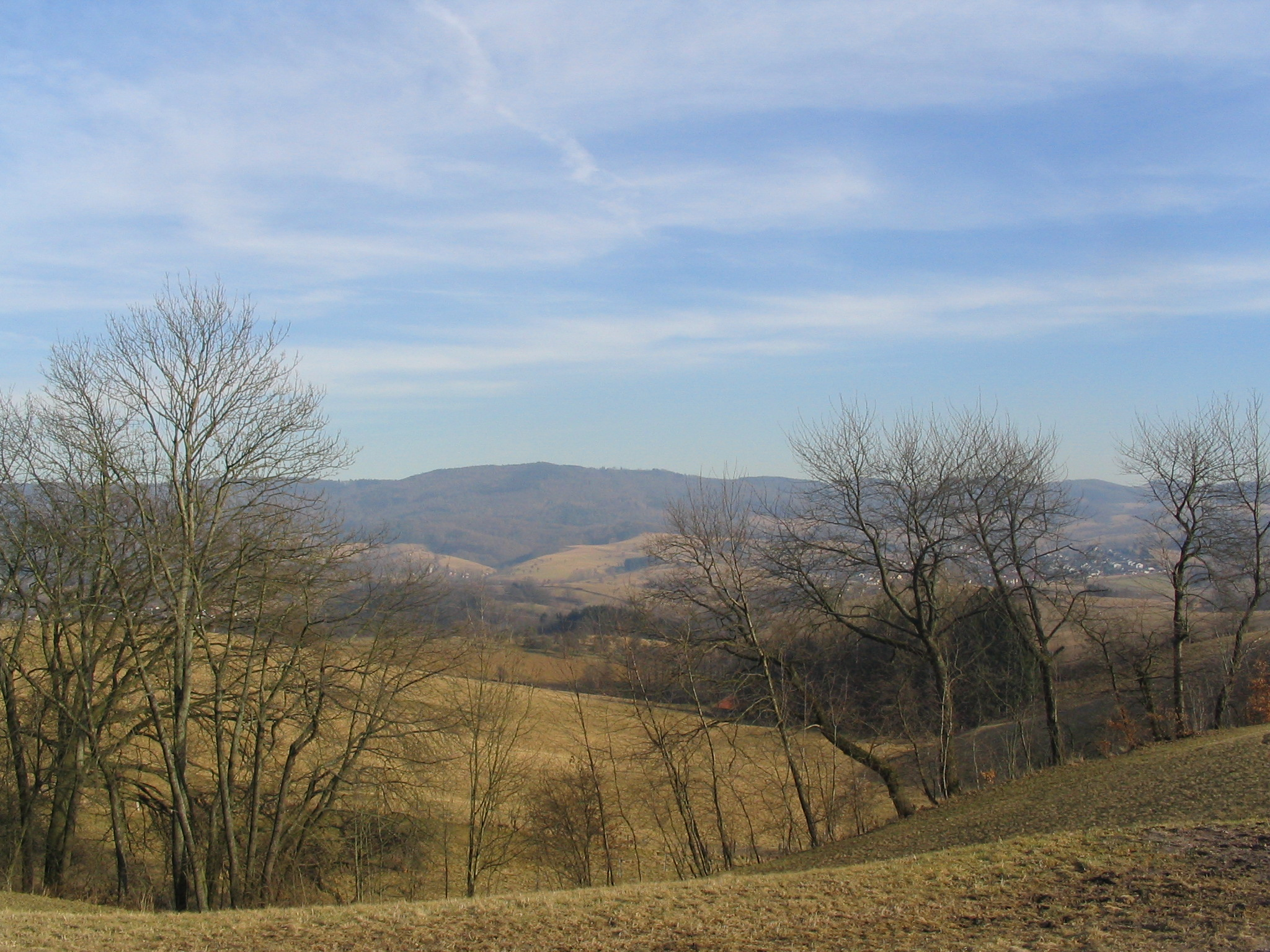 Trommgranit-Gebirgszug vom gegenüberliegenden Harzofen (Weschnitzpluton) aus